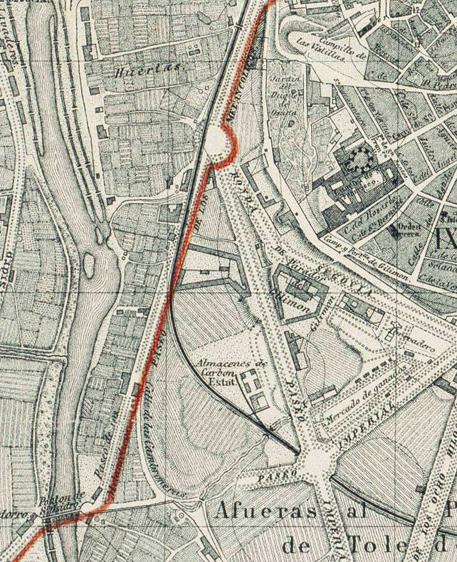 Zona en la que se levantó en 1881 la estación de Imperial, en la Guía del plano de Madrid y sus contornos en 1877 de José Pilar Morales. - 4ª ed. - Madrid: Tipografia de Gregorio Estrada, 1877